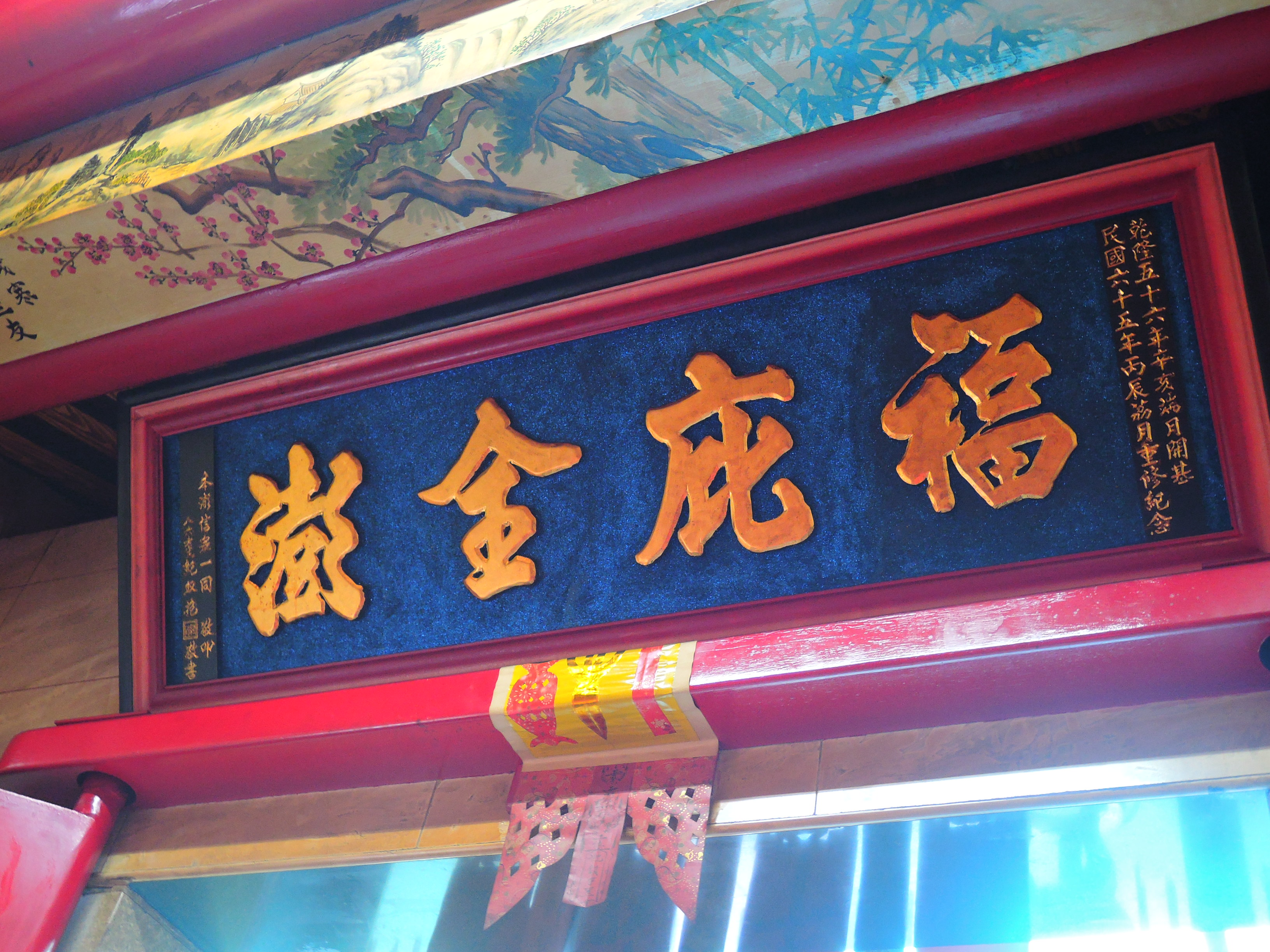 福德善後祠｜福庇金澎匾，紀雙抱題